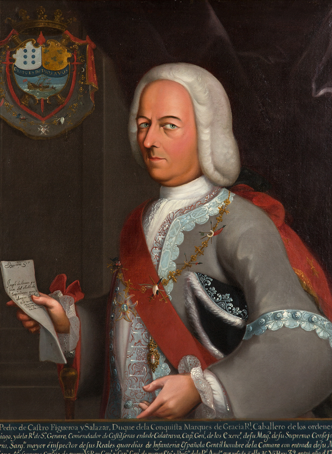 Portrait of Pedro de Castro, 1st Duque de la Conquista (1678-1741))